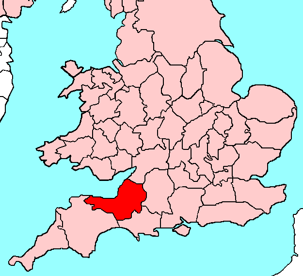 Somerset